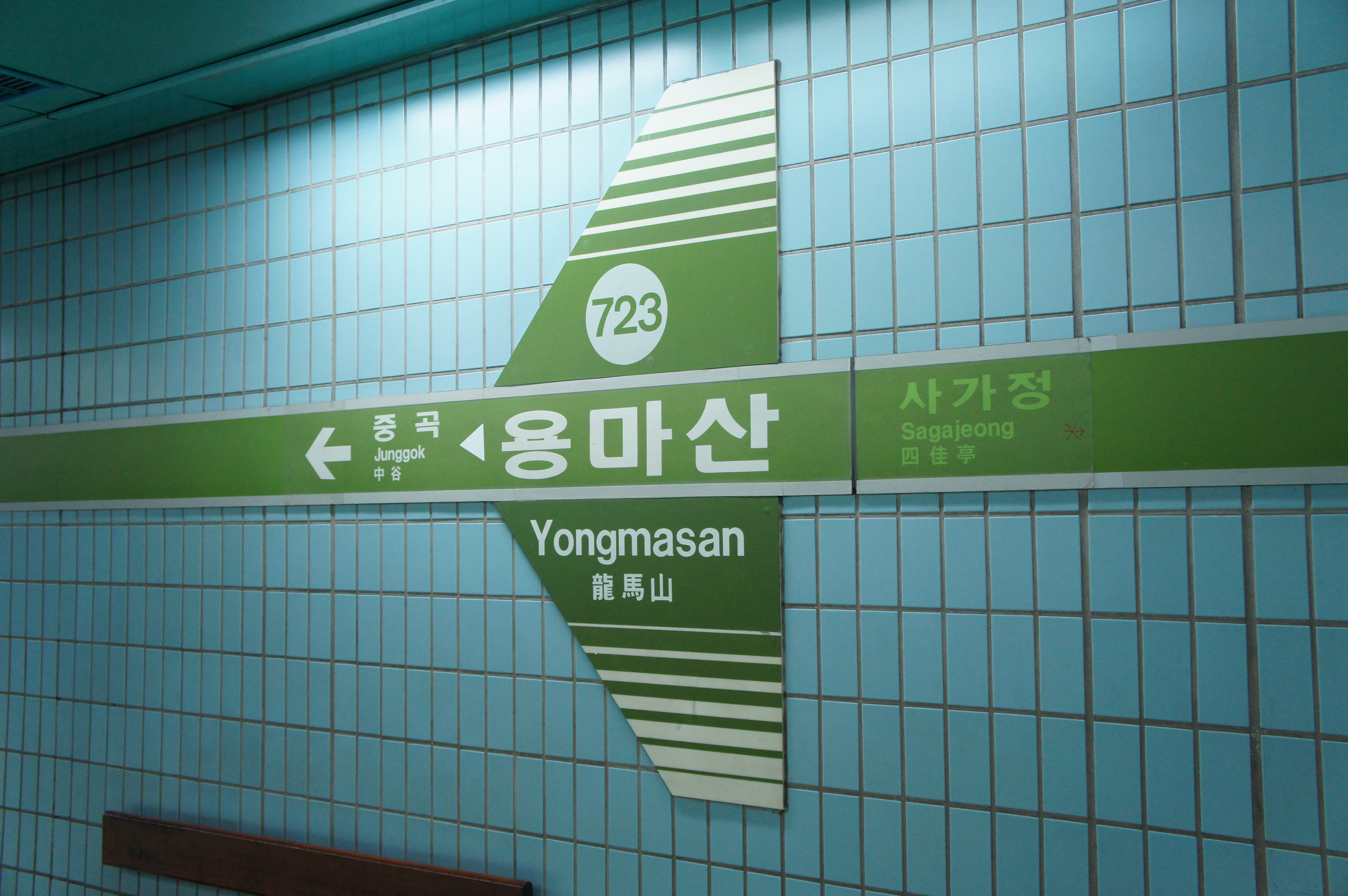 용마산역 역명판